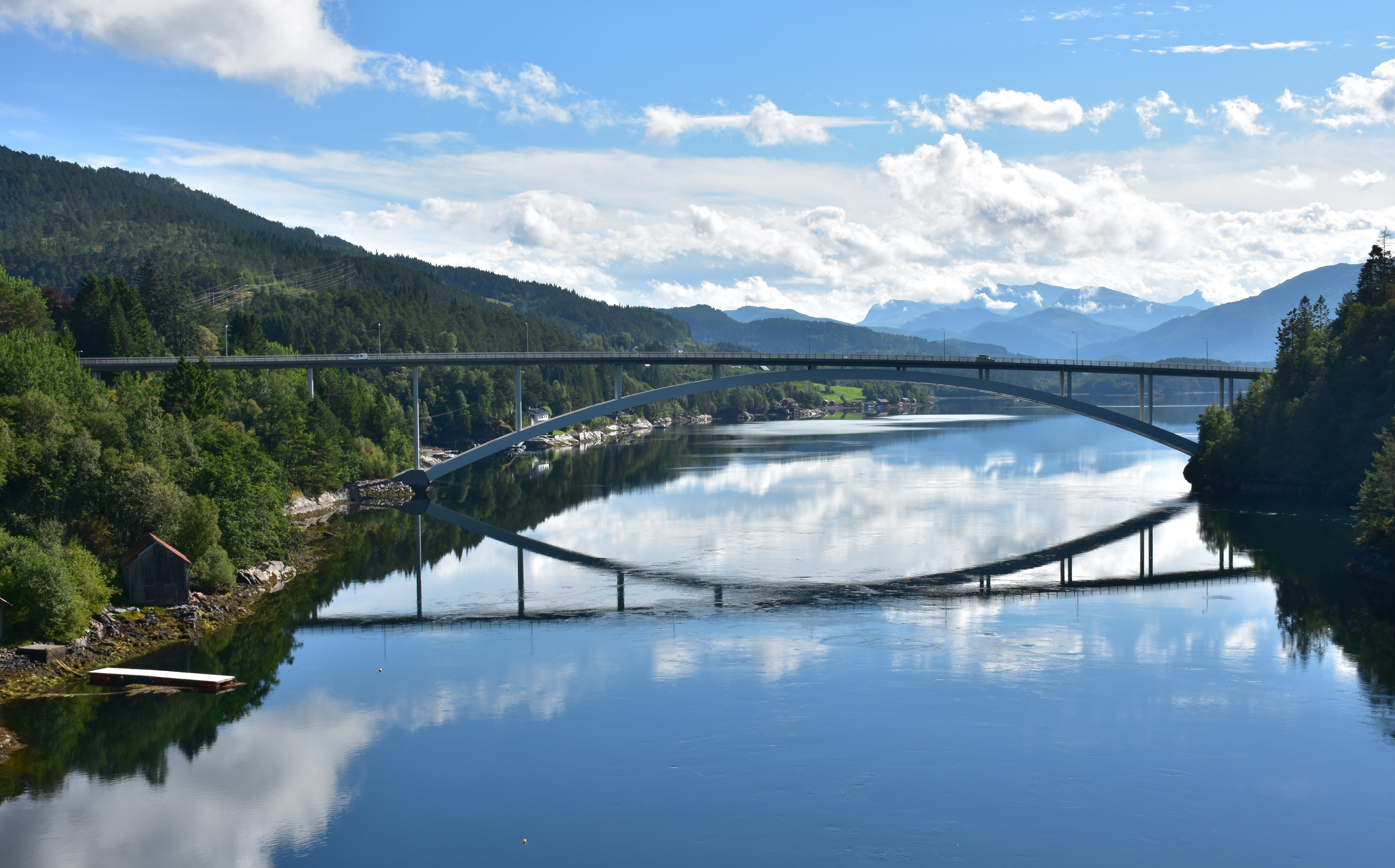 Straumsbrua fører Stettevegen (fylkesvei 661) over Skodjestraumen.